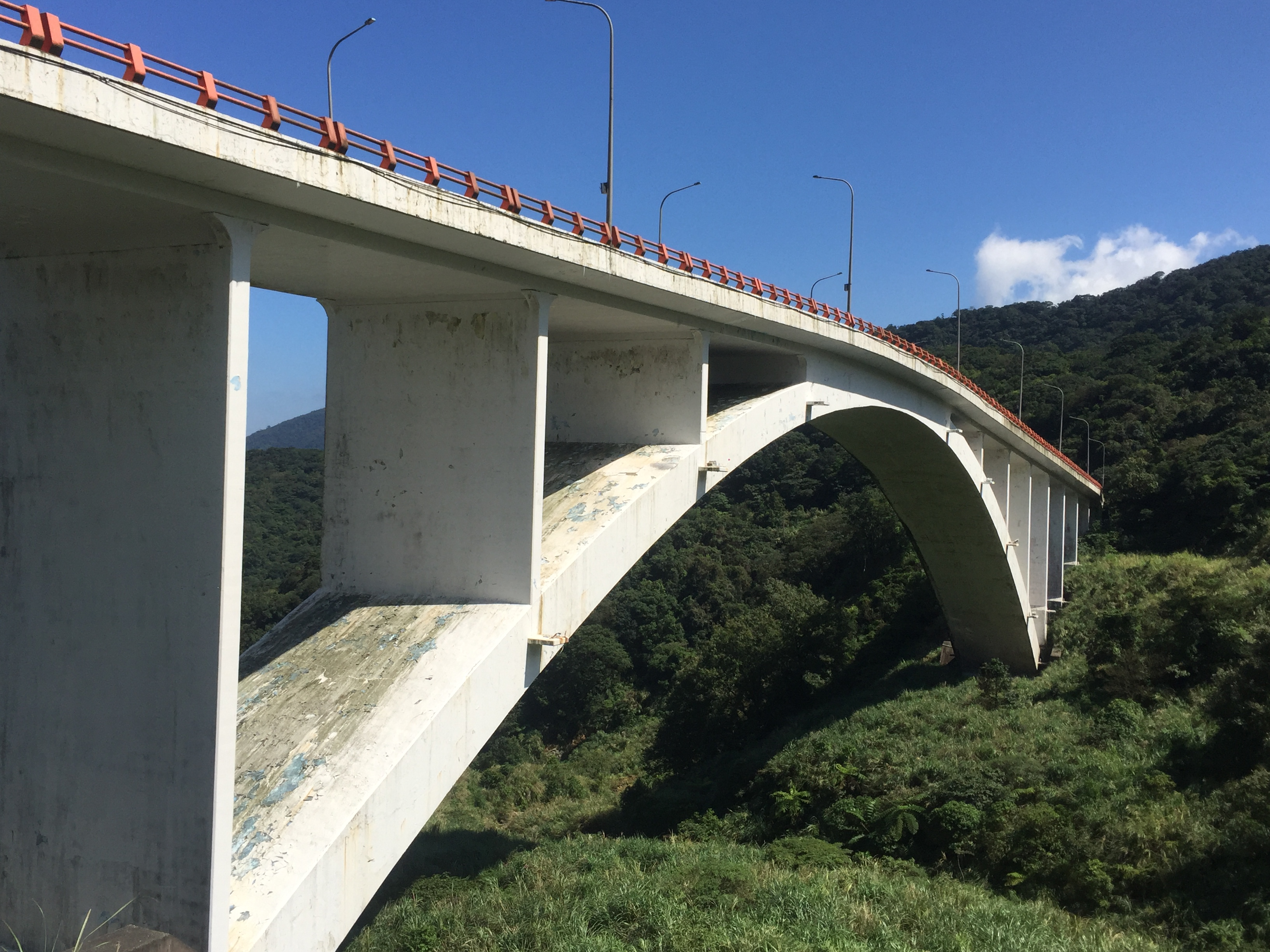 新北市台北市陽金公路台二甲線竹子湖路旁巷子福德宮旁馬槽橋之景色